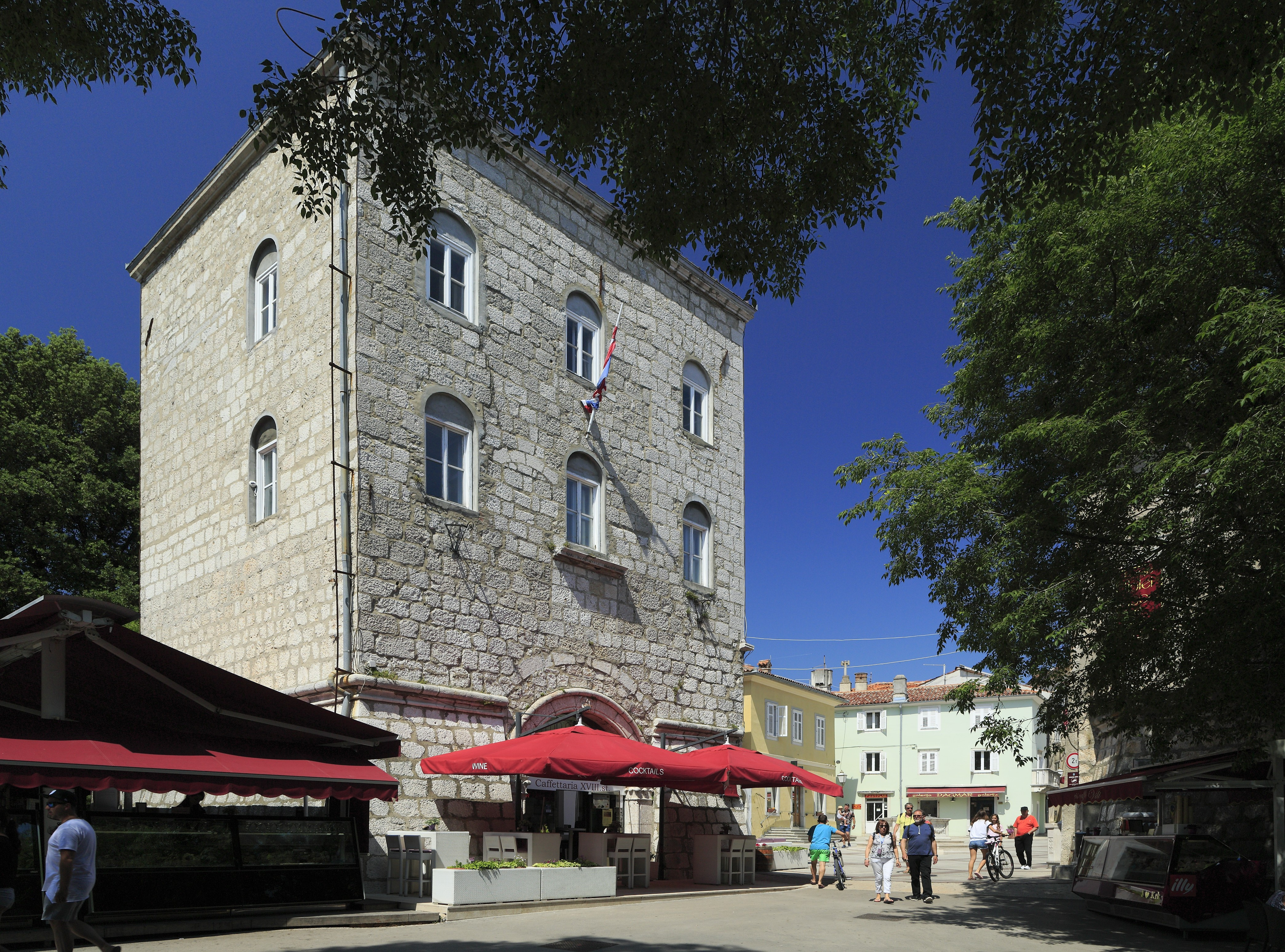 Das Rathaus ist ein ungewöhnlich kompakter Bau auf der Westseite der Vela placa. Möglicherweise war es ursprünglich Teil der Stadtbefestigung.